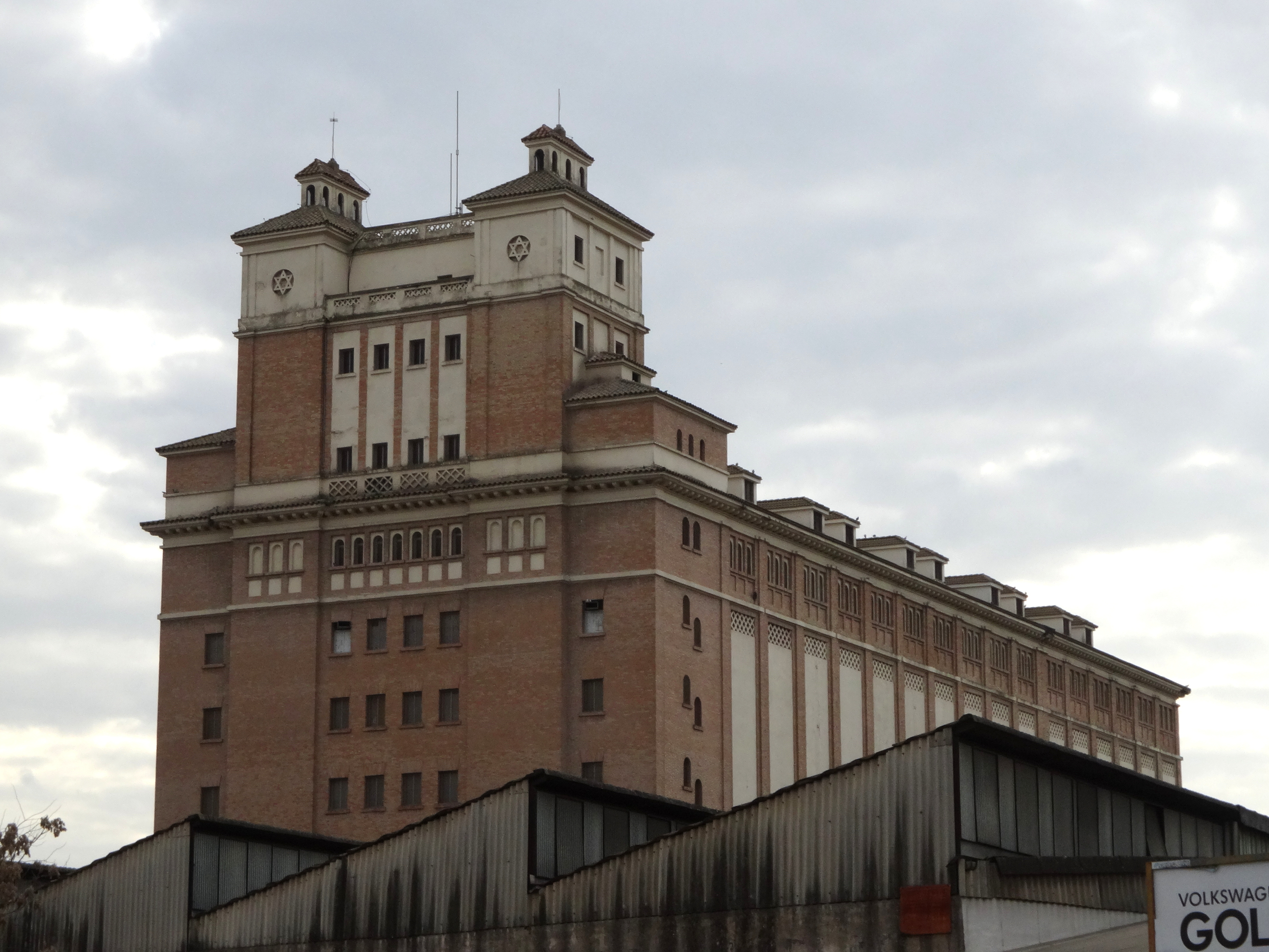 Silo de Córdoba (España).